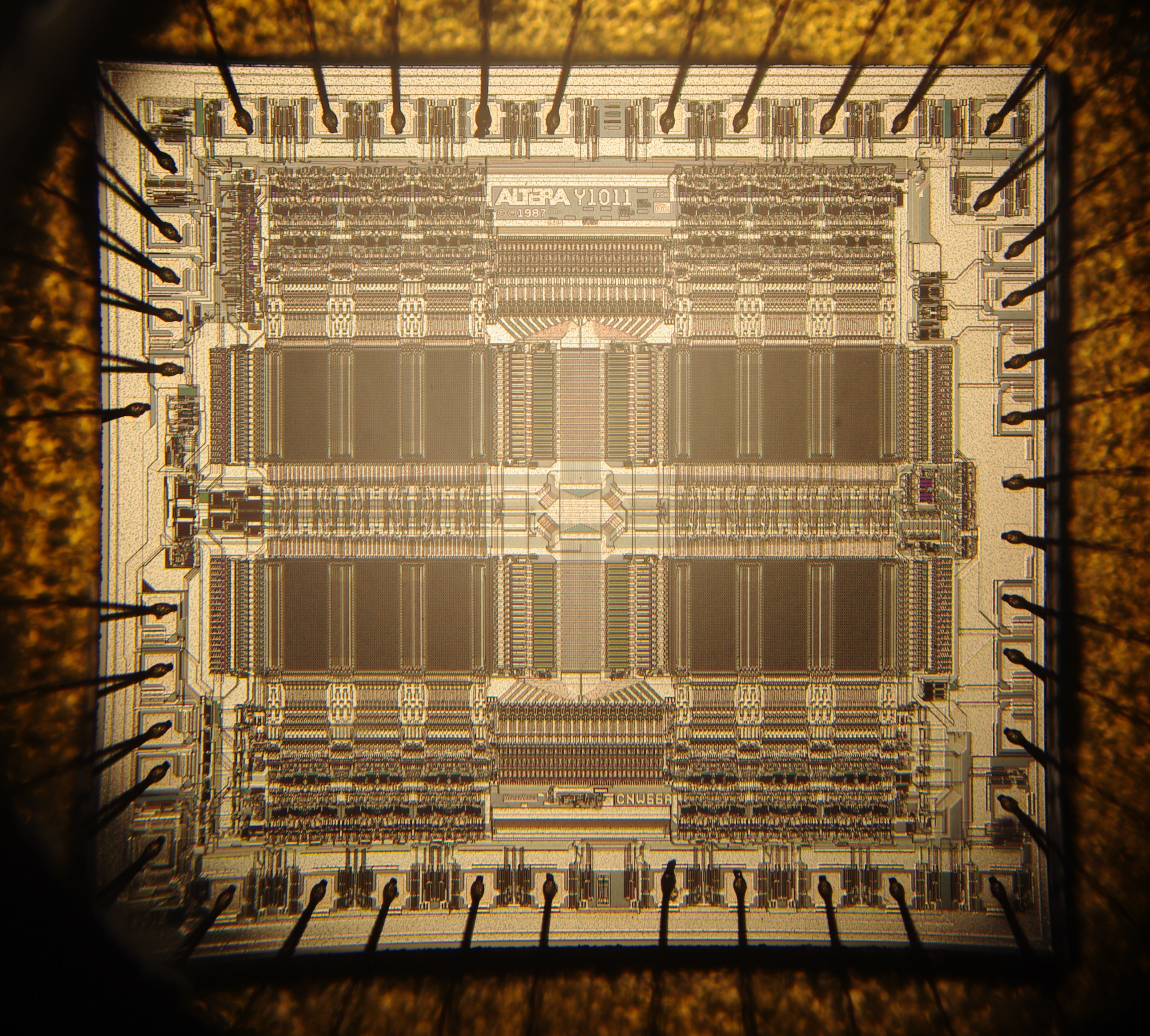 450 Gates, 24 Macrocells,12ns delay, 76MHz max.